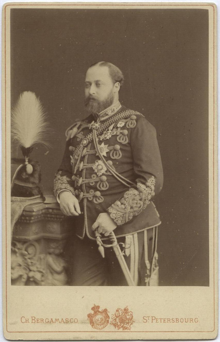 Albert Edward Prince of Wales